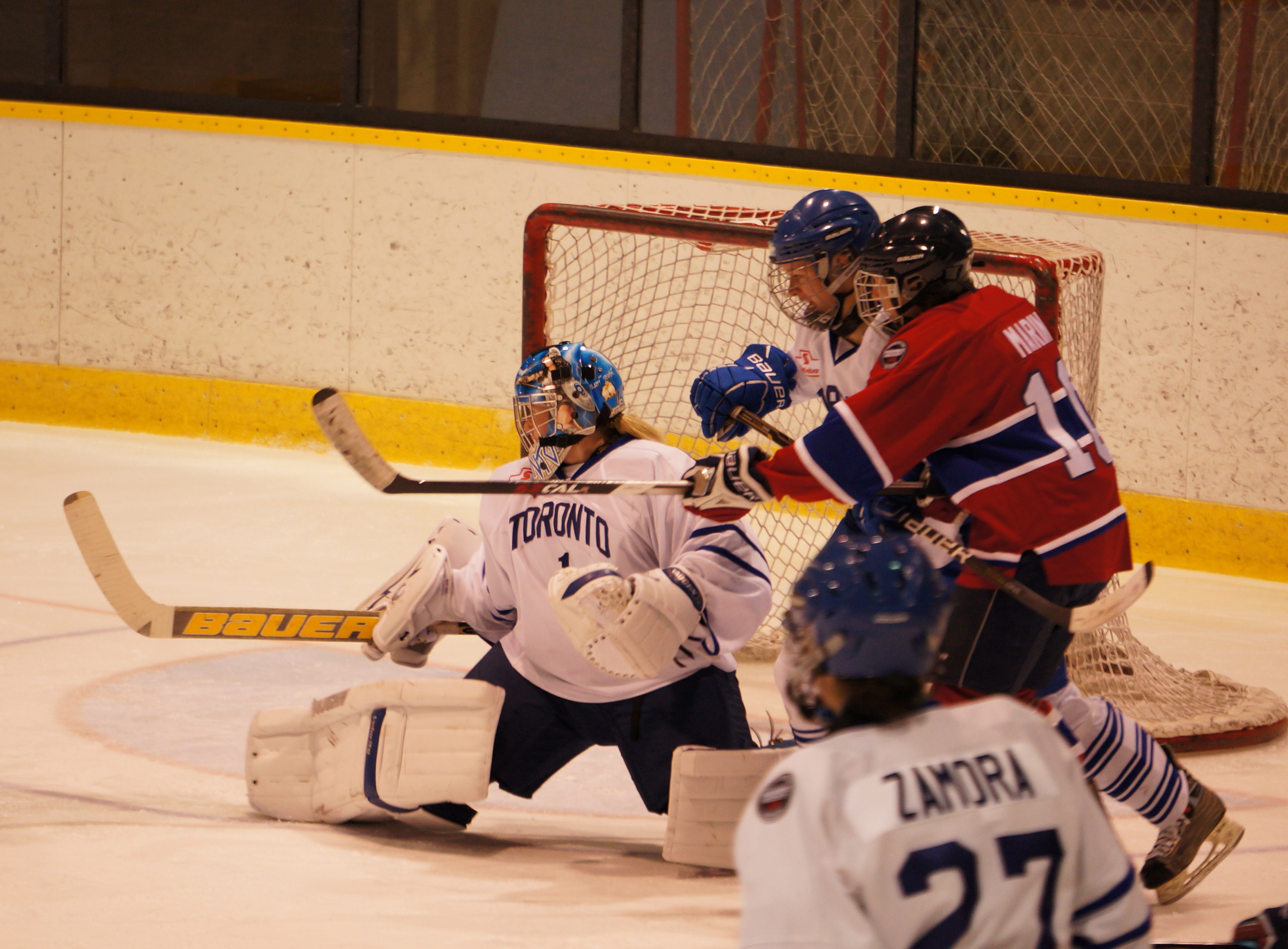 Sami Jo Small, Toronto Furies